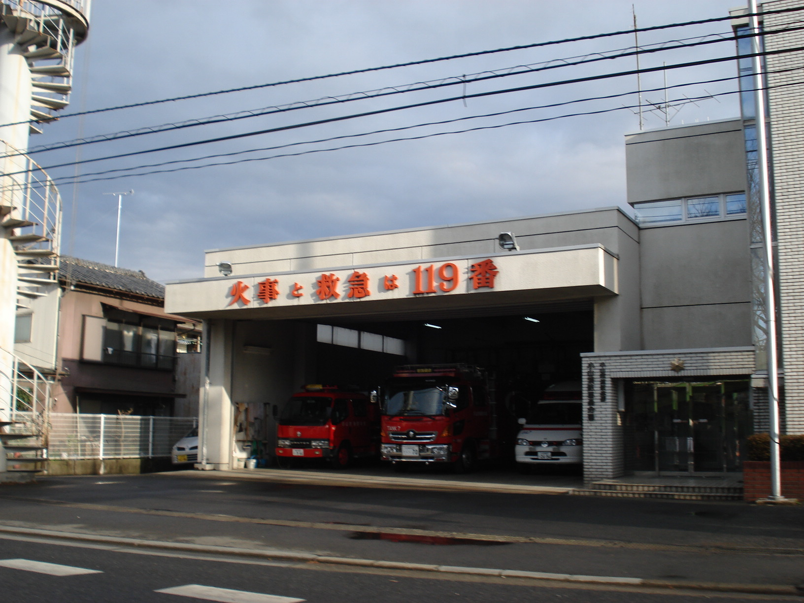 小山市消防本部桑分署 栃木県小山市羽川139